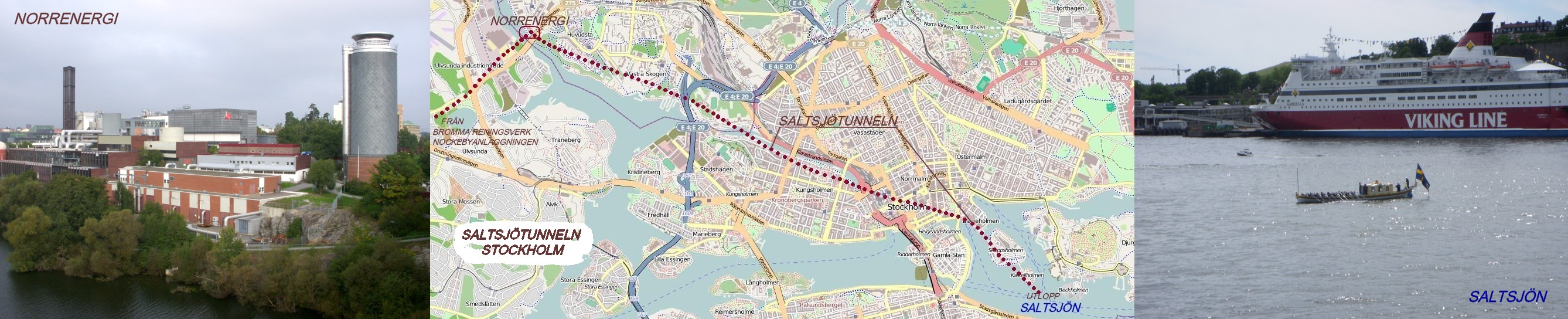 Saltsjötunneln Solna - Stockholm - Saltsjön OpenStreetMap cut-out (or derivative work based on it): without further descriptionThis cut-out may be incomplete, and may contain errors, or may be obsolete. Don't rely solely on it for navigation. See the image in the present state and its original context on the OpenStreetMap wiki page for Stockholm